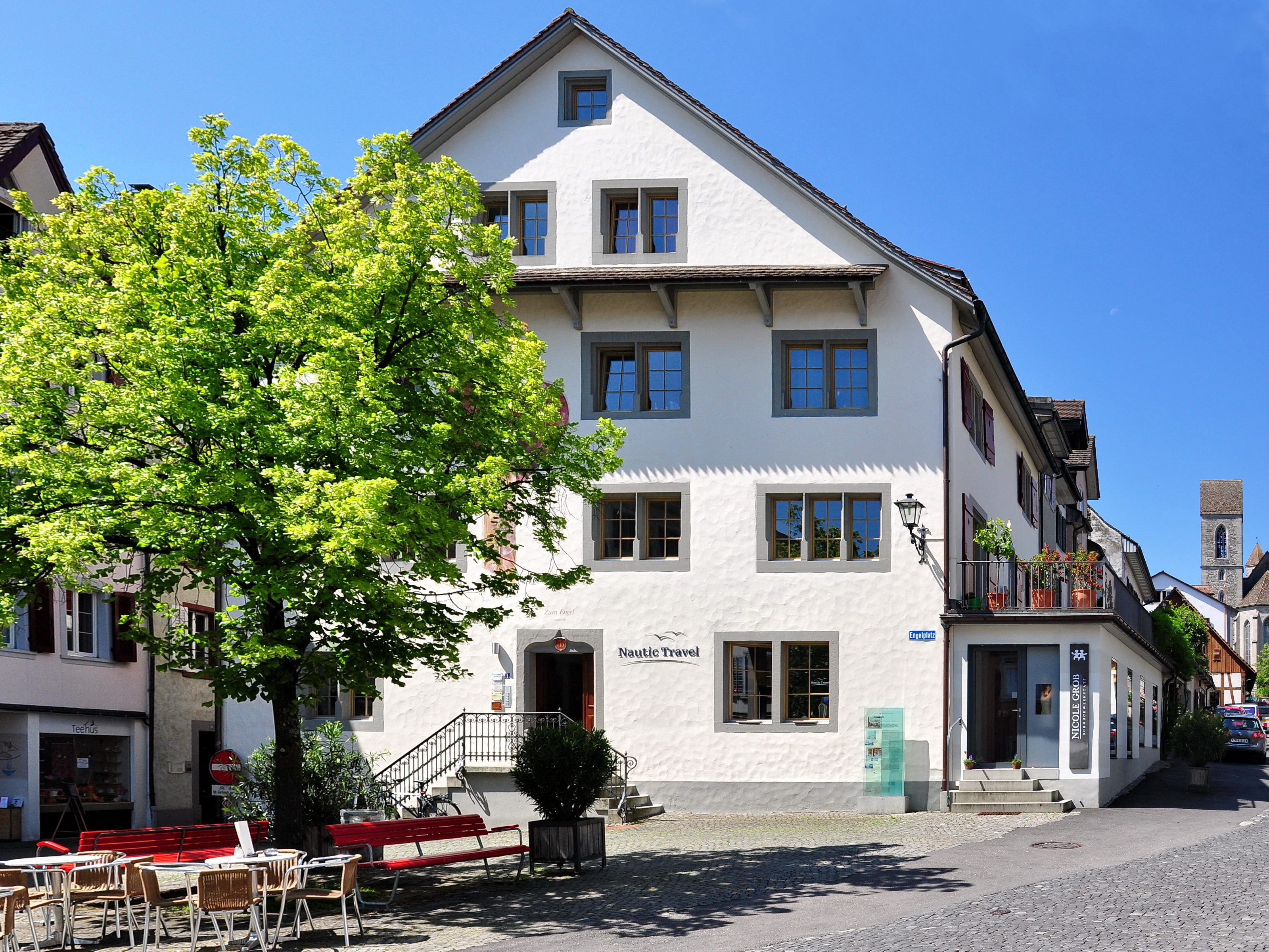 Haus zum Engel at Engelplatz square in Rapperswil (Switzerland), Halsgasse to the left, Herrenberg and Stadtpfarrkirche to the right